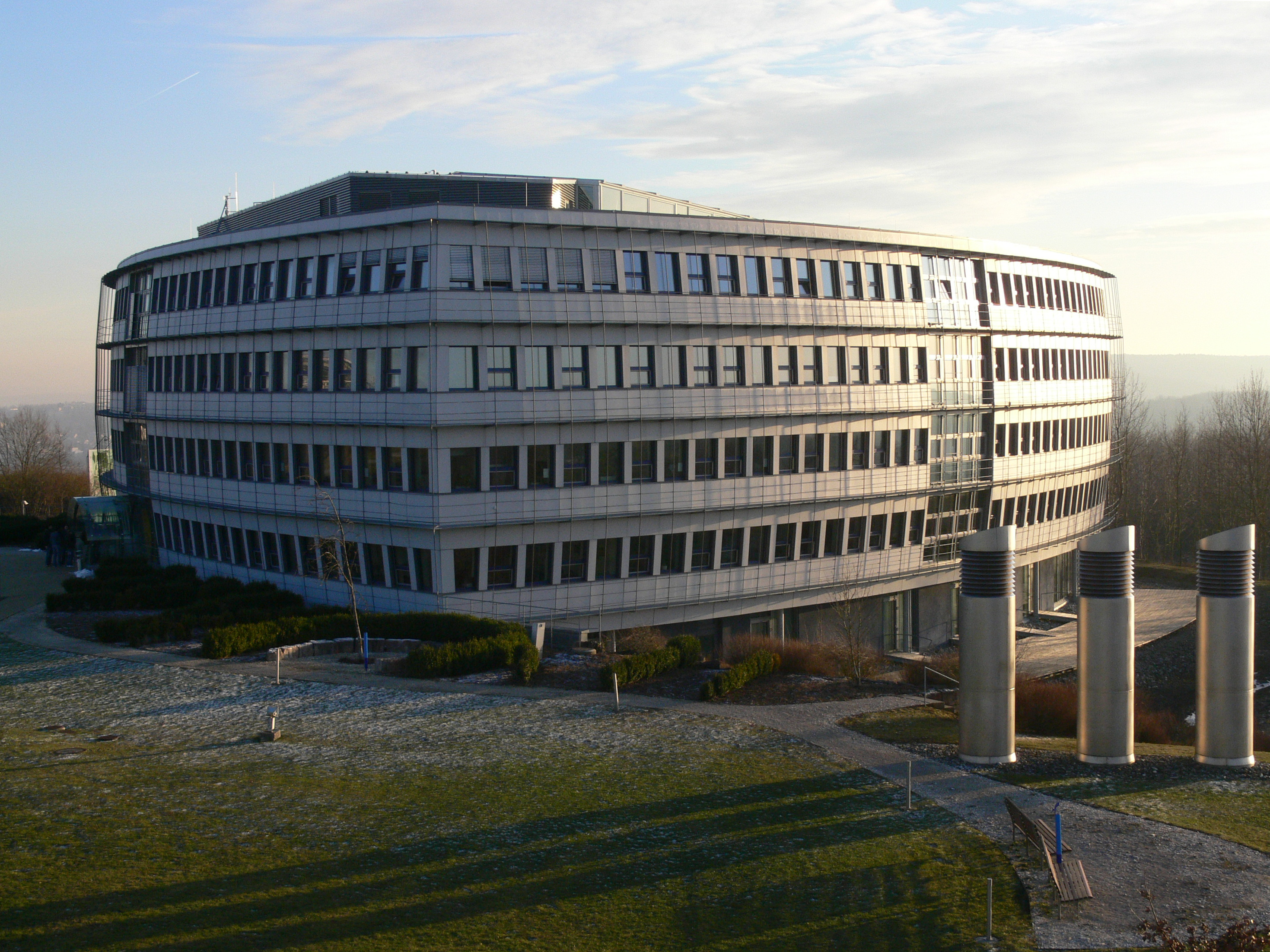 Energon Bürogebäude Ulm im Science Park.